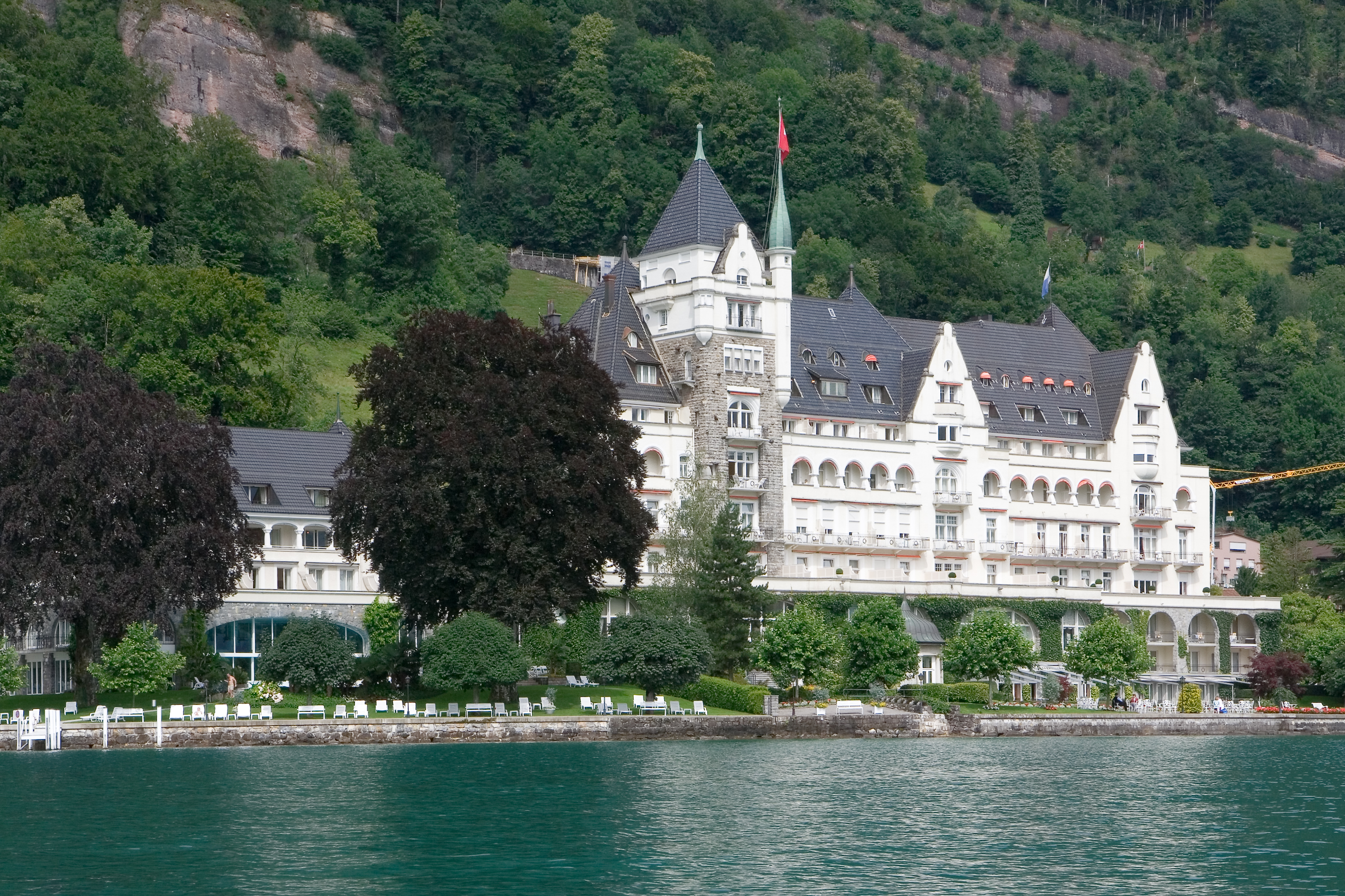 Das Park Hotel in Vitznau, Schweiz